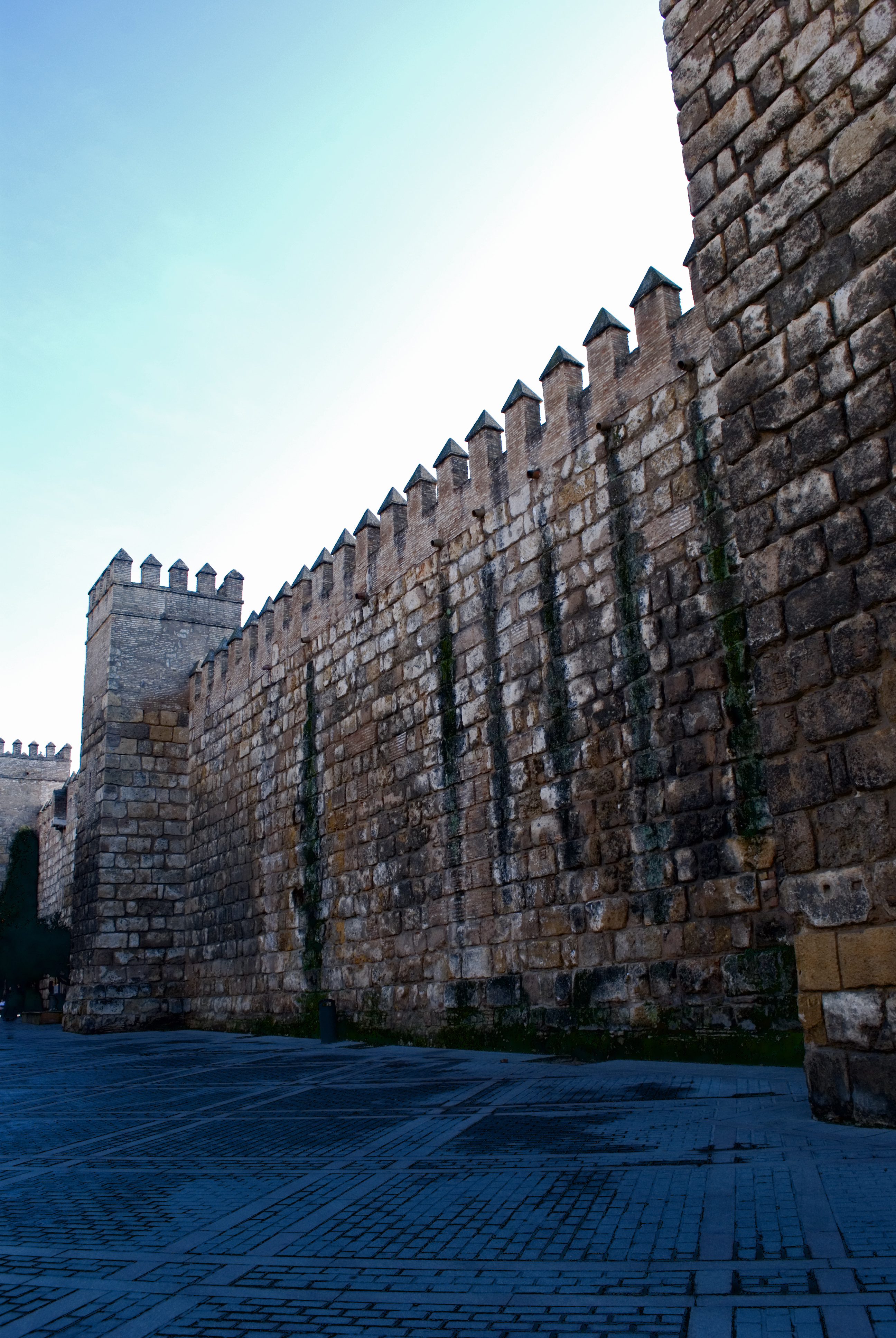 Vista exterior de la muralla del Alcázar de Sevilla.